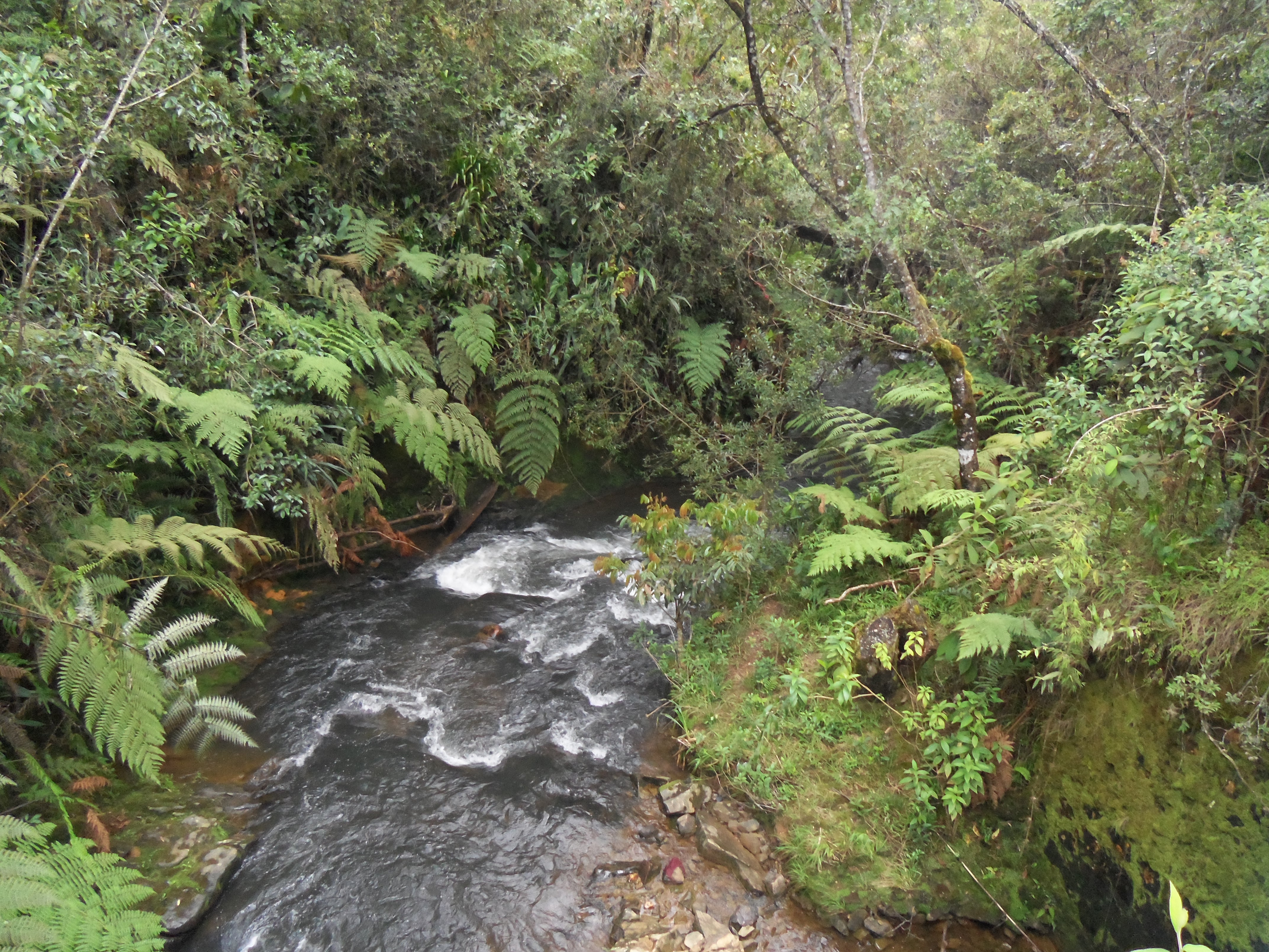 San Felipe, Copacabana, Antioquia, Colombia